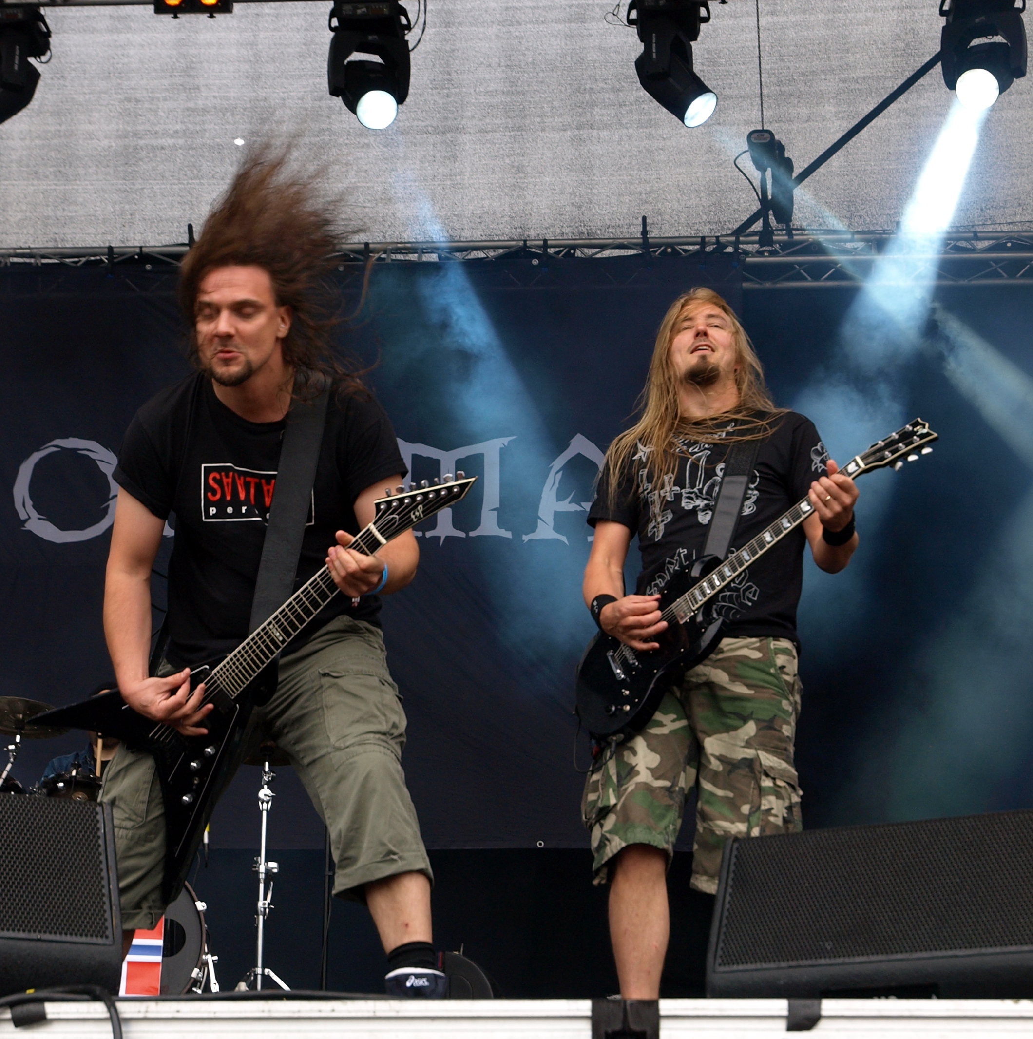 Mokoma live am Myötätuulirock 2011